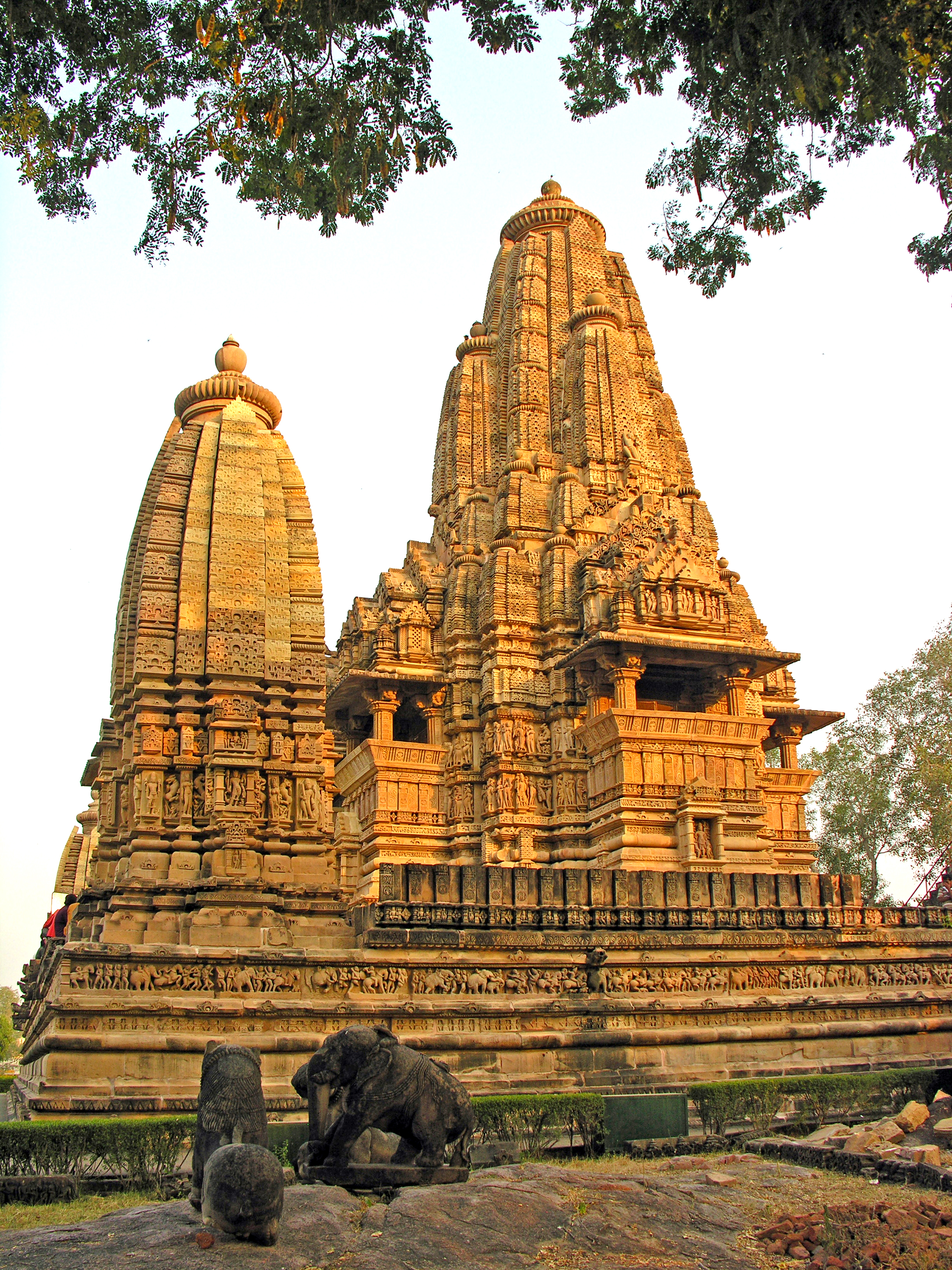 India-5679